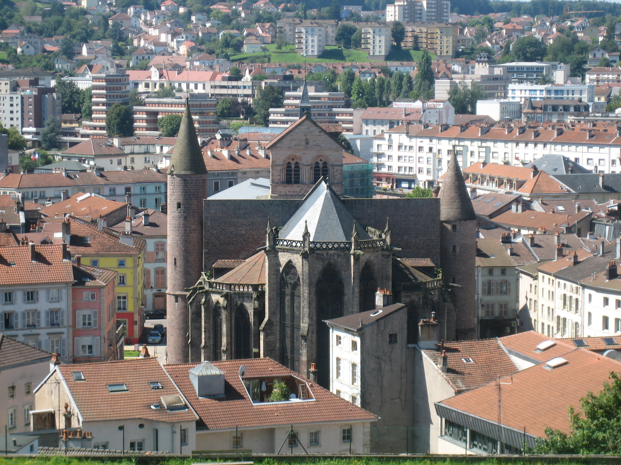 Basilique Saint-Maurice vue du parc du château, Épinal, France